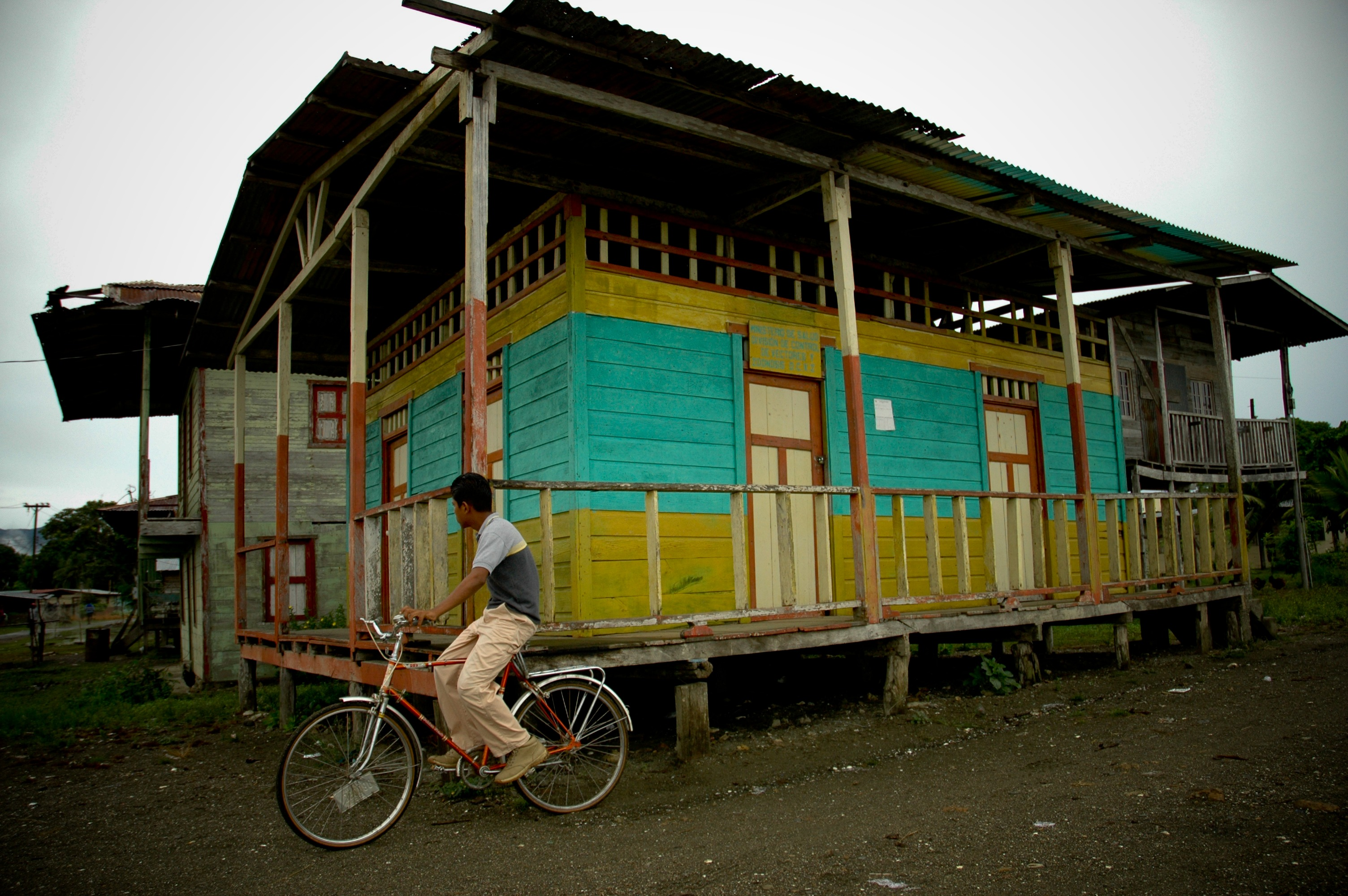 Casa en Garachiné, Darién